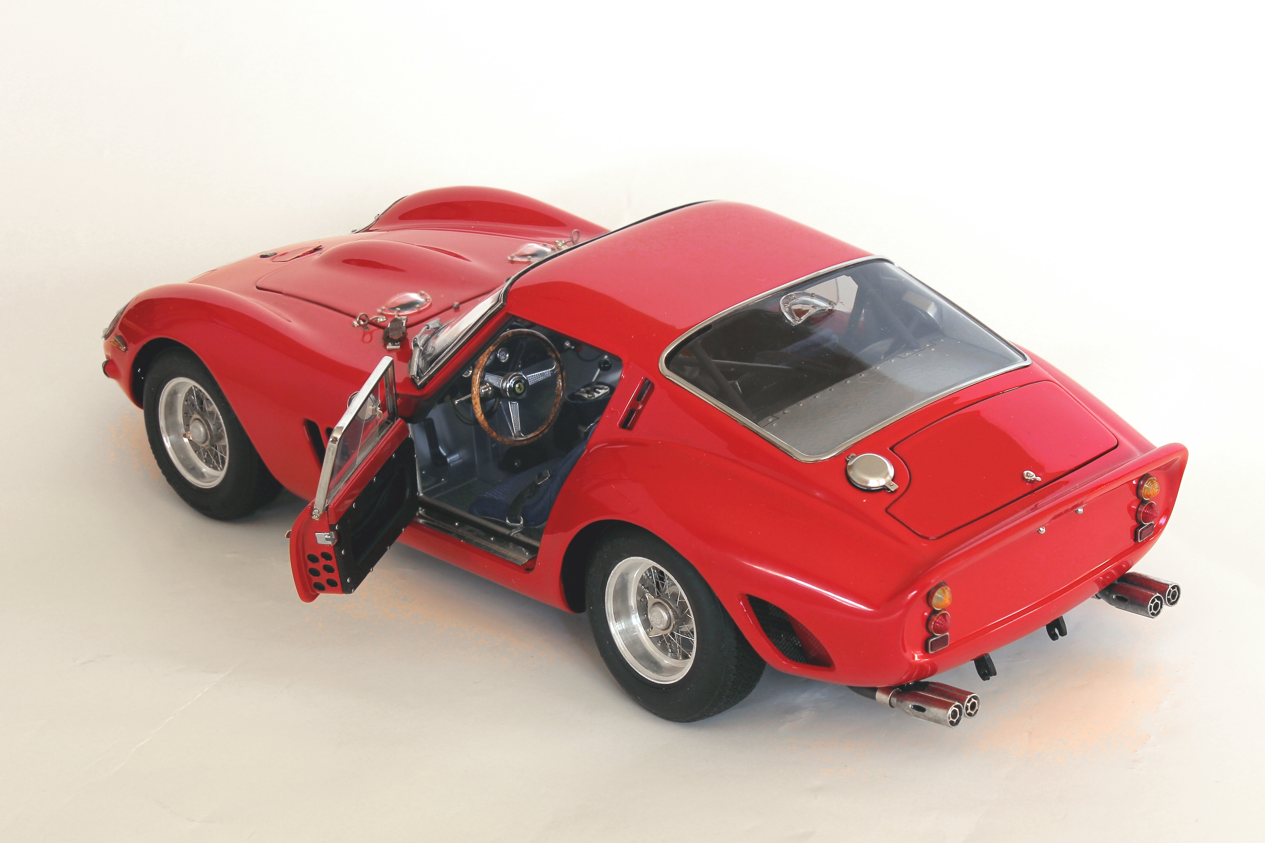 Modell eines Ferrari 250 GTO, Baujahr 1962, von CMC